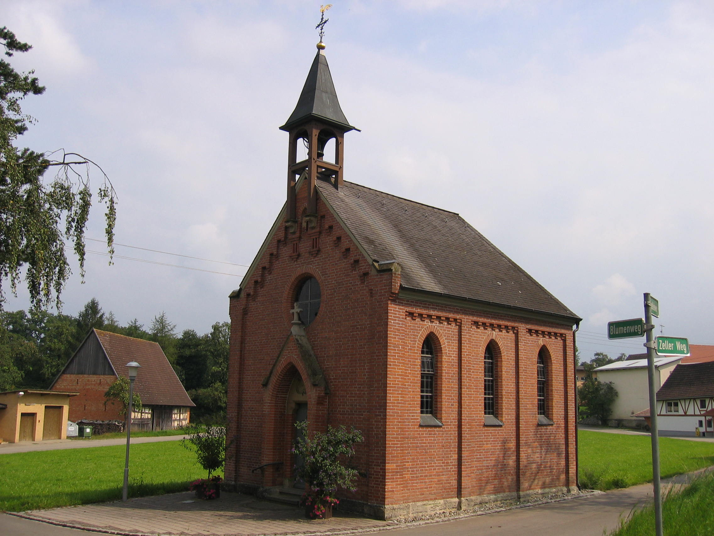 Kappele in Ettisweiler